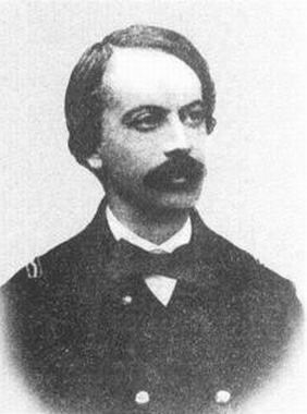 Guglielmo Acton